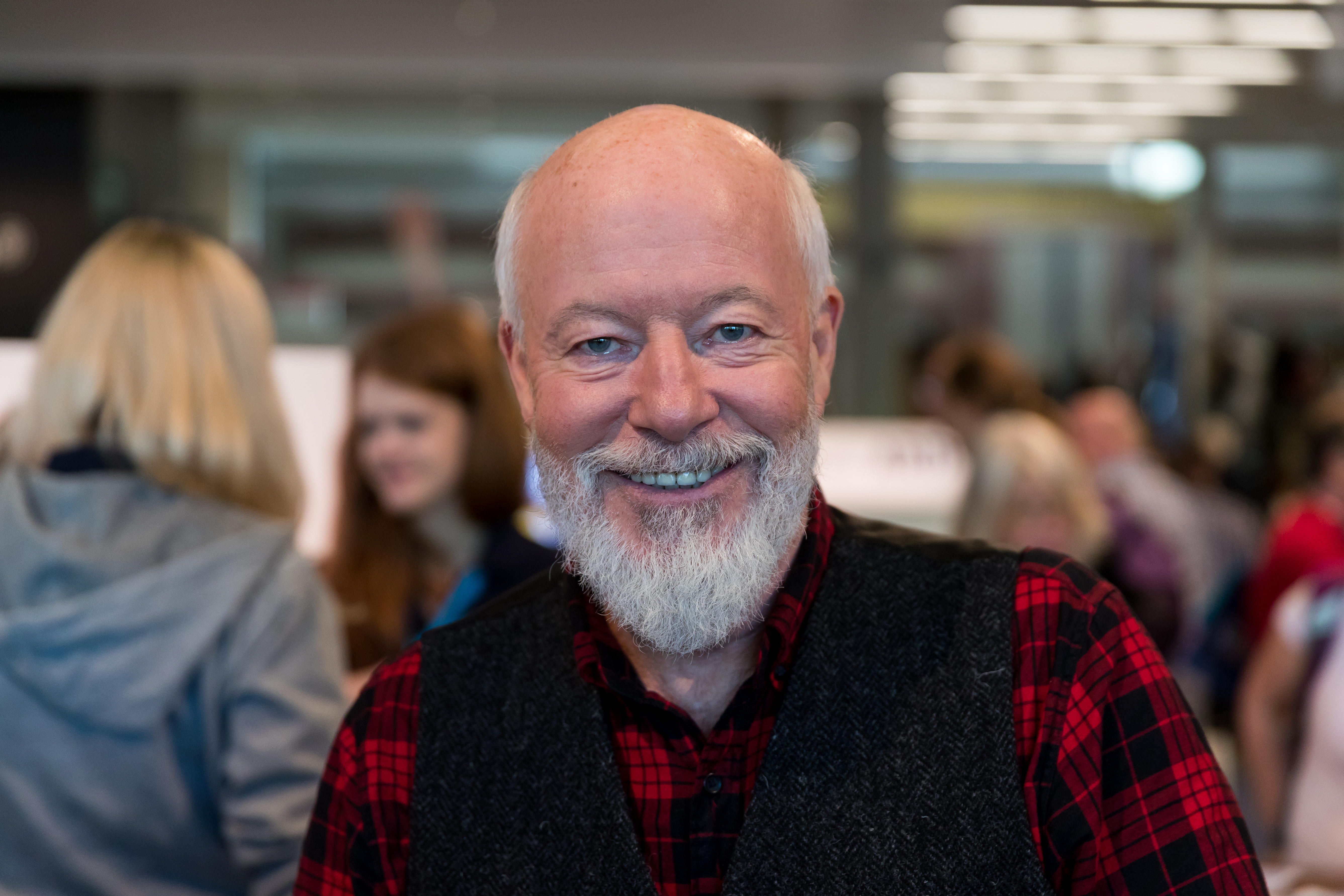 Bill Mockridge during Buchmesse at Messegelände, Frankfurt, Hessen, Germany on 2017-10-14, Photo: Sven Mandel